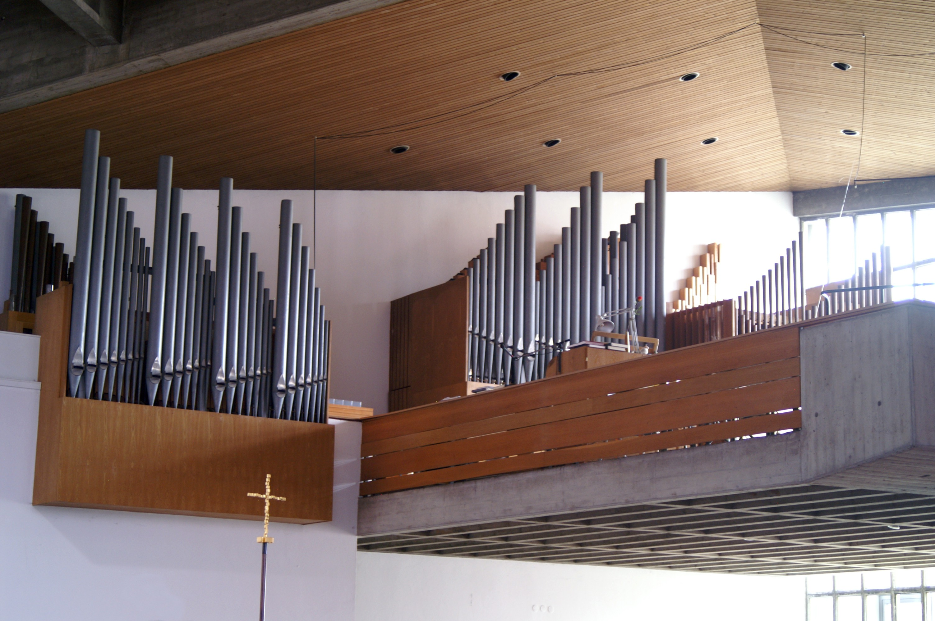 Orgel von Herz Marien in Regensburg, erbaut von Eduard Hirnschrodt